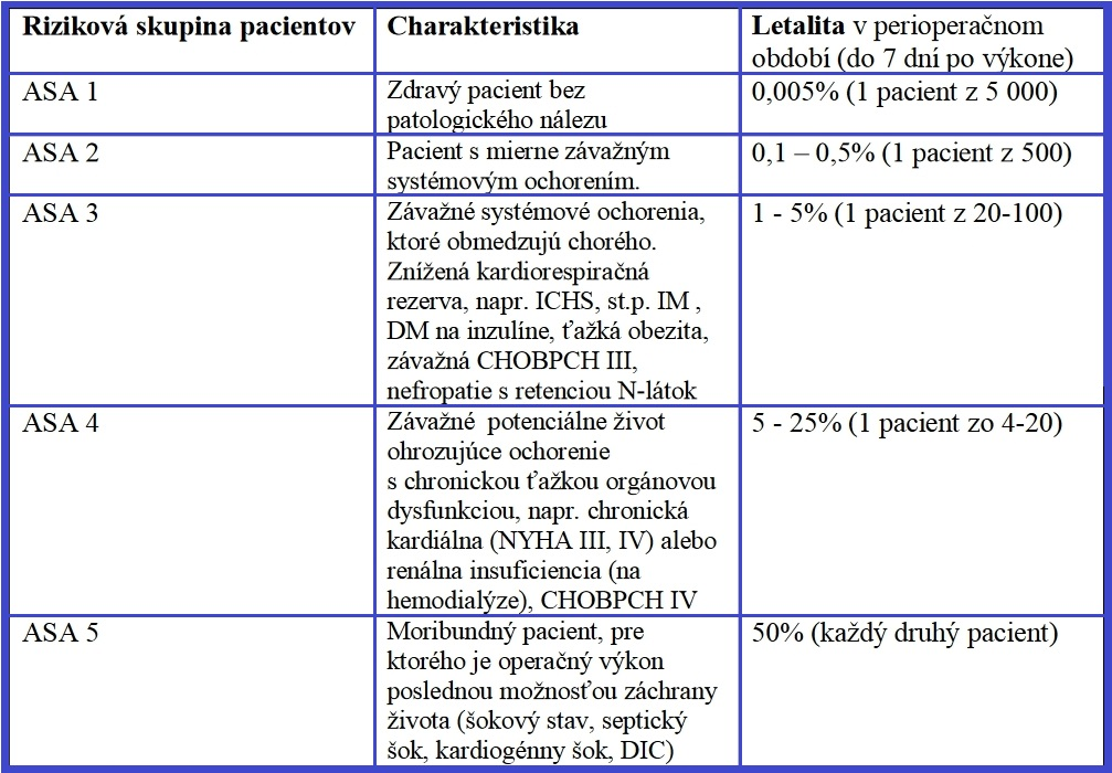 Klasifikácia zdravotného stavu a rizika pri celkovej anestézii podľa ASA (American Society of Anesthesiologists)